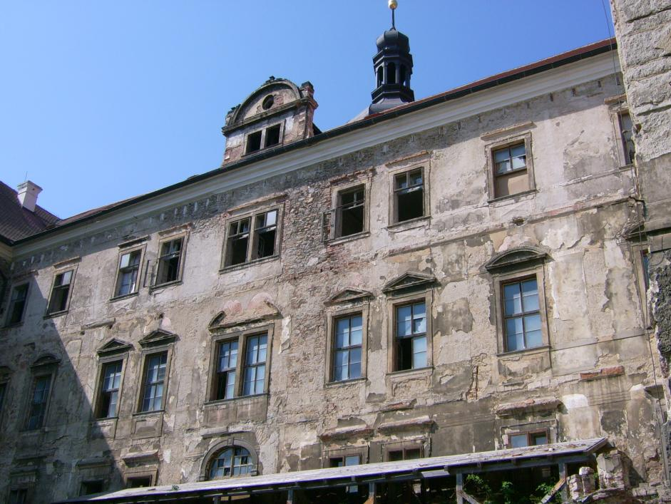 Východní průčelí zámku.